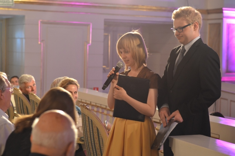 Stypendyści Fundacji Geremka podczas uroczystości w Teatrze Stanisławowskim photo: Monika Lisiewicz